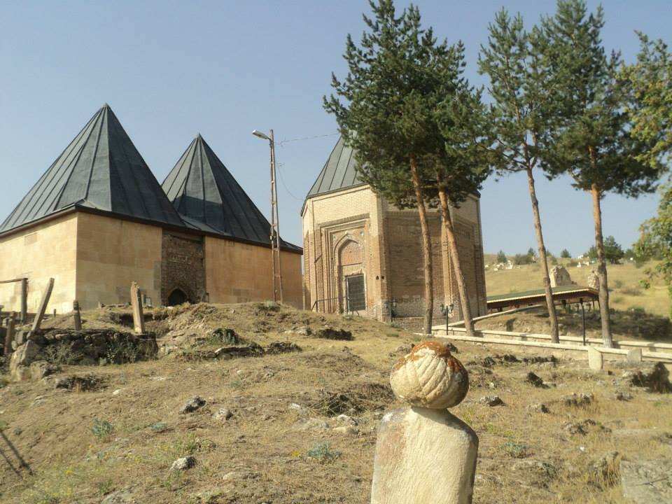 Sultanmelik Künbetleri-Kemah